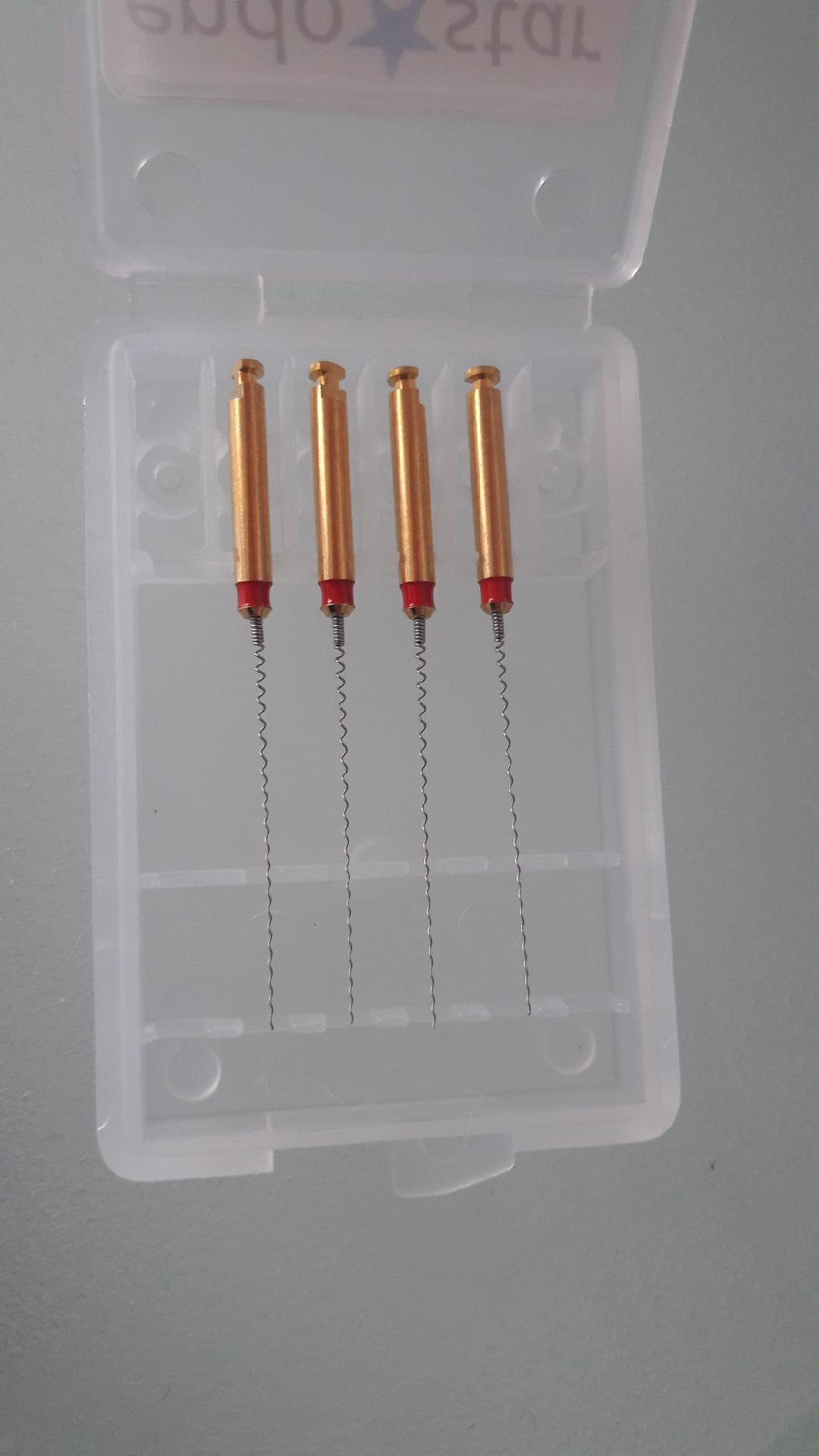 zdjęcie zrobione specjalnie do uzupełnienia hasła